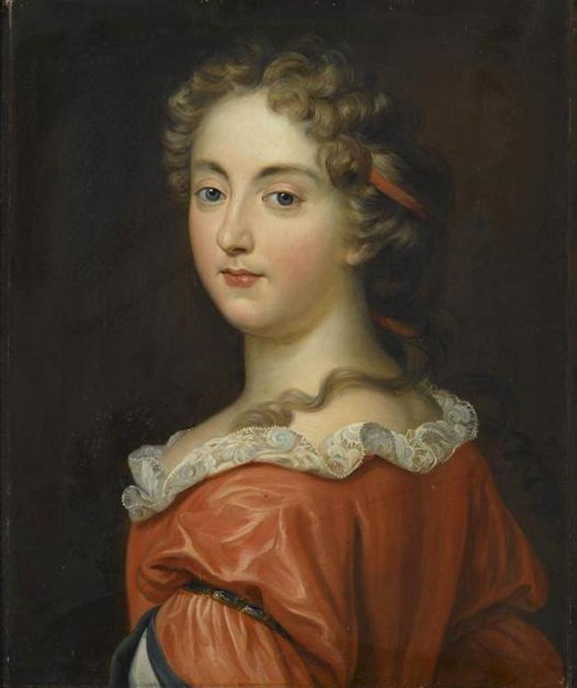 Le tableau, oeuvre d’un élève d’Abel de Pujol, fut copié sur une œuvre de la collection des ducs d’Orléans.